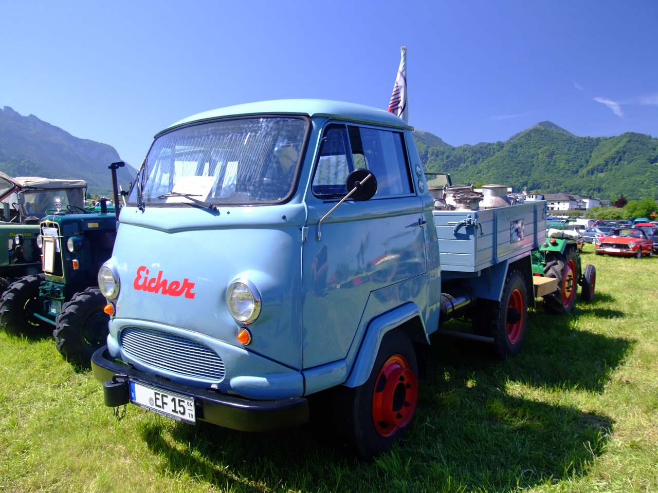 Quelle: selbst fotografiert, 05/2007 Fotograf: Späth Chr.